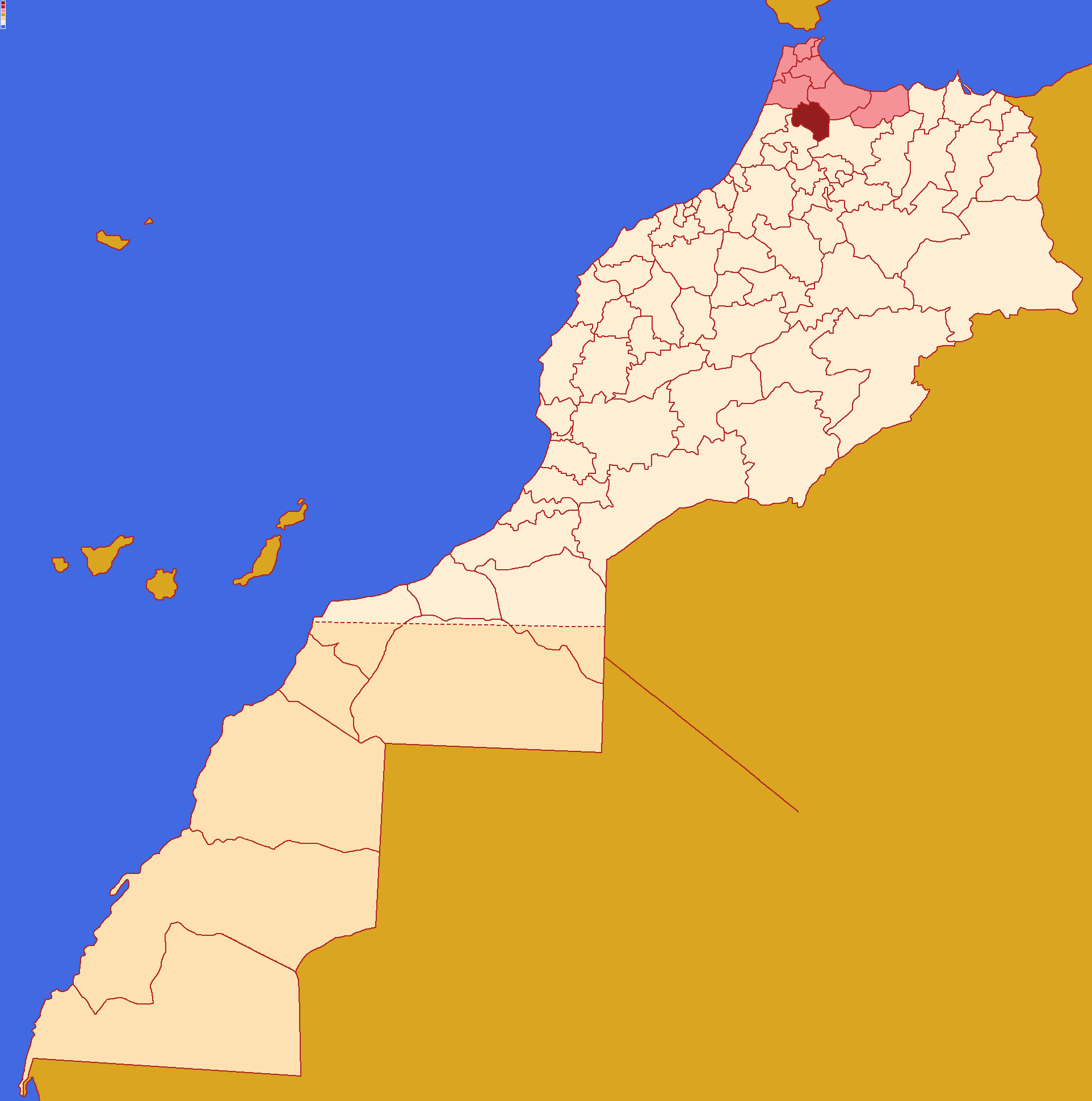 Localização da província de Ouezzane dentro da região de Tânger-Tetuão-Al Hoceïma e dentro de Marrocos. Conforme a reforma administrativa de 2015.